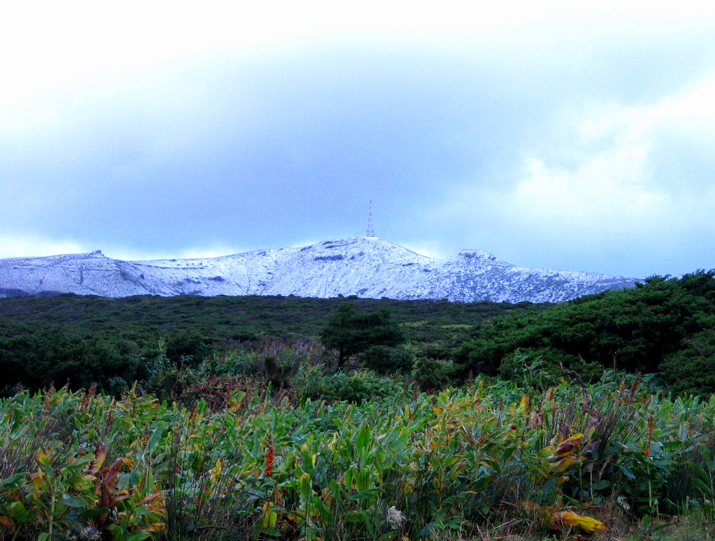 Morro Alto coberto de neve, Ilha das Flores, Açores